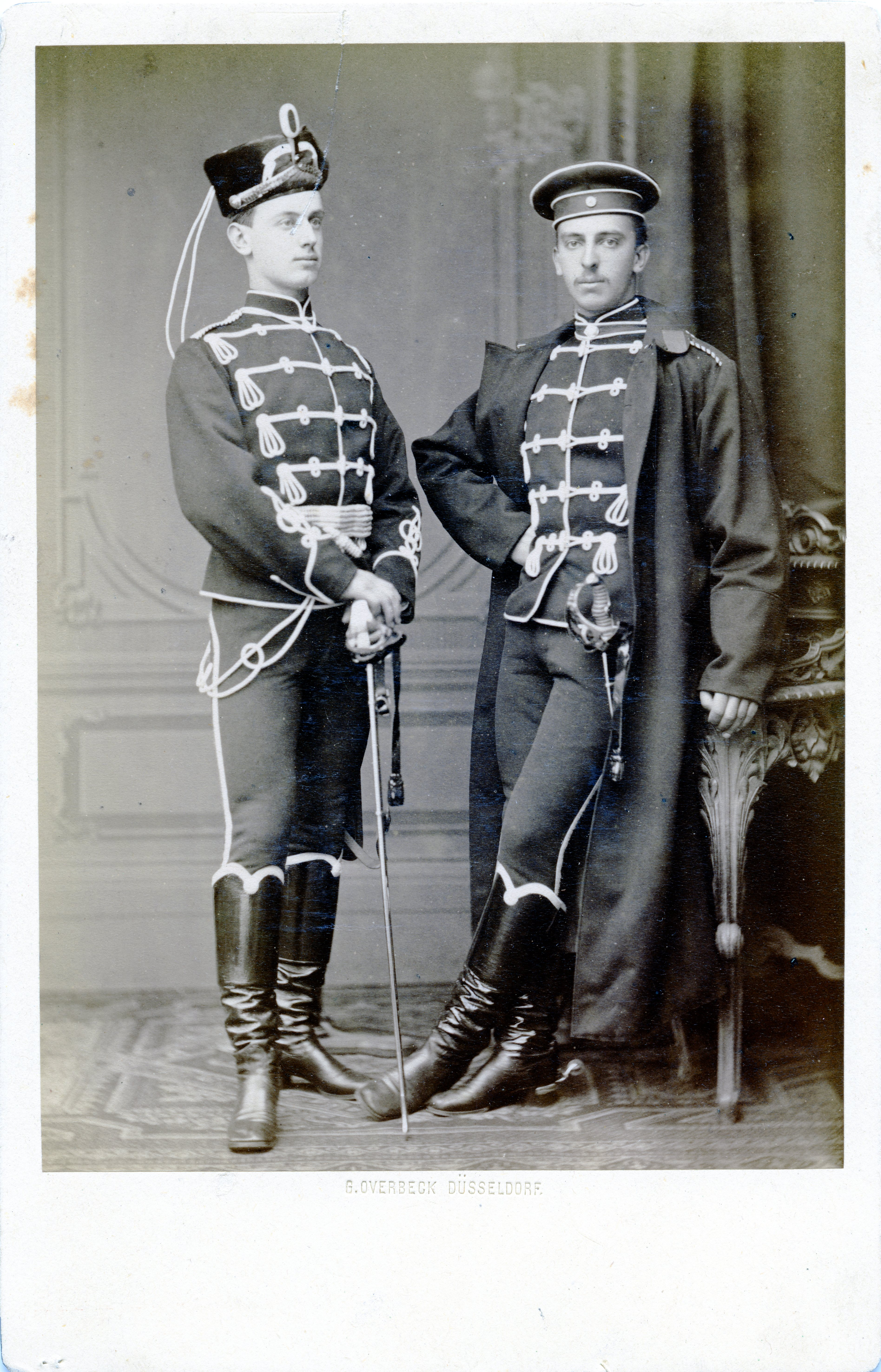 Zwei junge Herren (Johannes und Ernest Merck) in Husaren-Uniformen, bestehend aus kniehohen Stiefeln, engen Hosen und trassierten Jacken, nebeneinander stehend; der linke Mann steht aufrecht und stützt die vor dem Bauch verschränkten Hände auf einen Degen auf; der rechte Herr ist locker an einen Tisch gelehnt. v.l.n.r.: Johannes Theodor Merck (* 1855 in Manchester; † 10. April 1934 in Hamburg) [1] Ernest William Merck (* 5. Juni 1854 in Manchester; † 9. Oktober 1939 in Hamburg)[2]